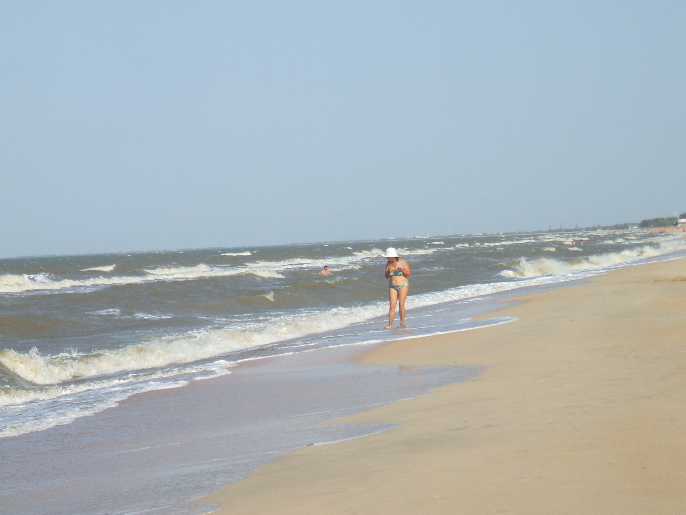 Вид на Азовское море в станице Голубицкая